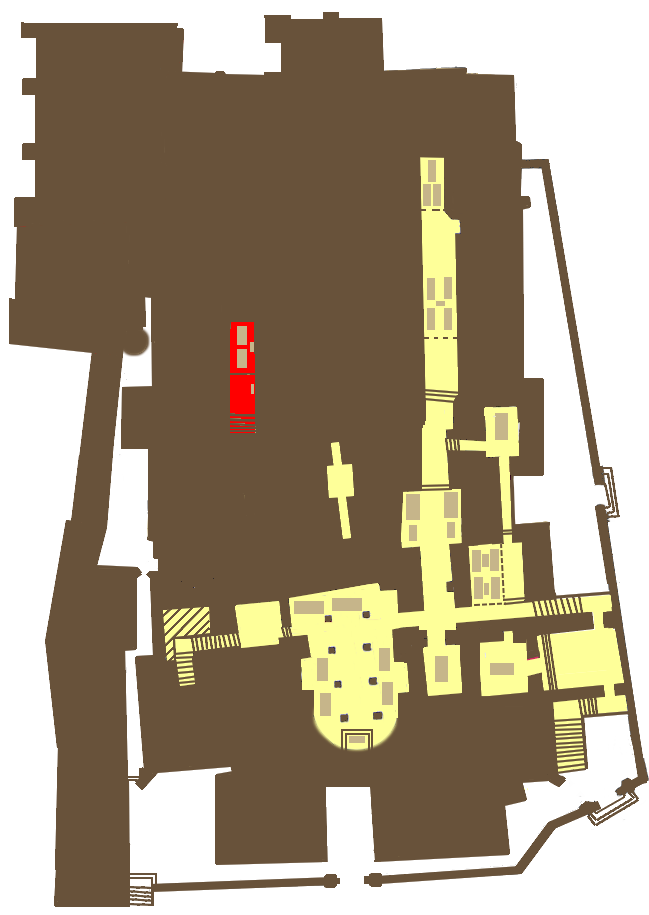 Krypta Wieszczów Narodowych na planie podziemi Katedry Wawelskiej